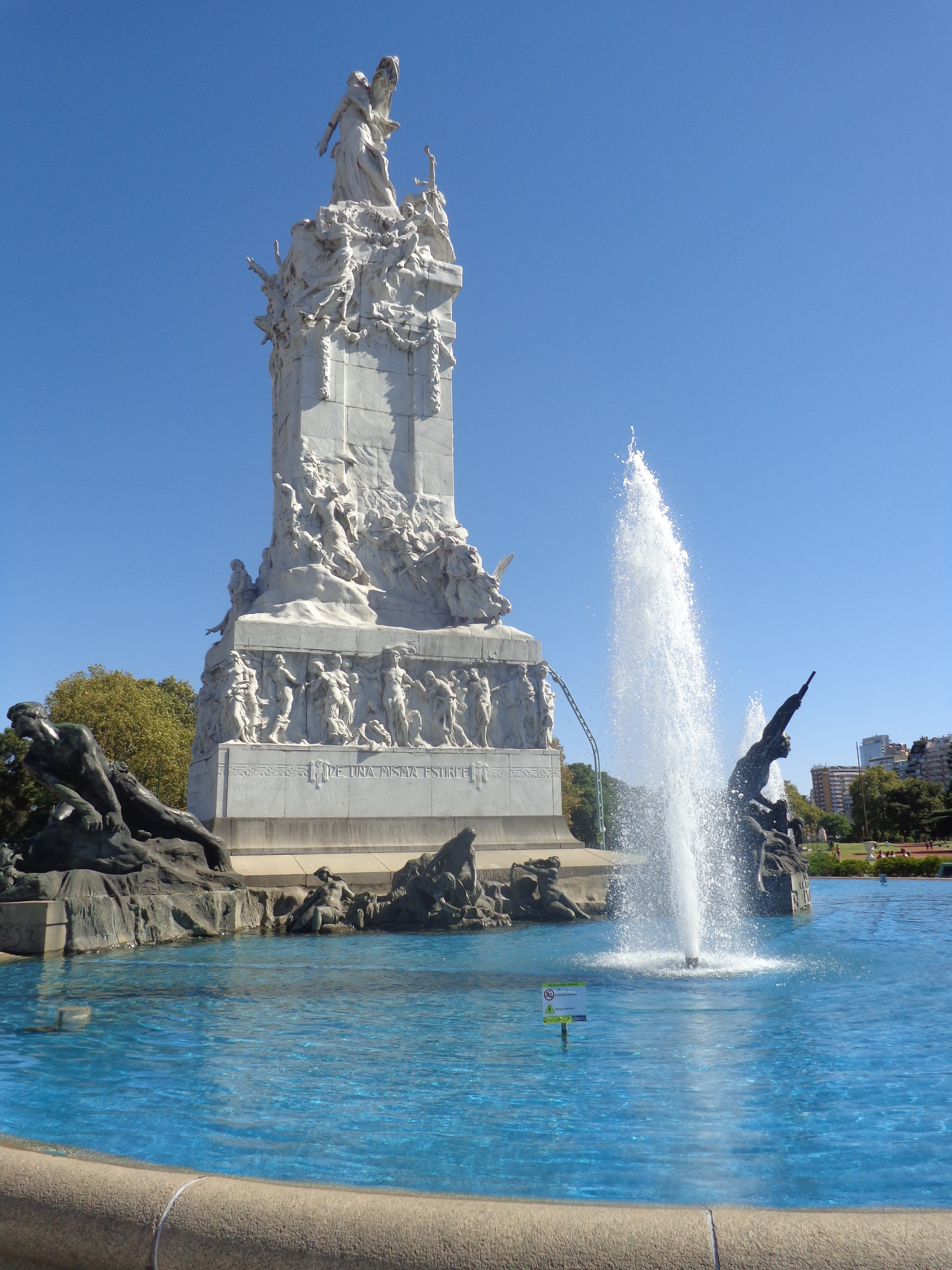 Monumento a La Carta Magna y las Cuatro Regiones Argentinas o De los Españoles. Buenos Aires, Argentina